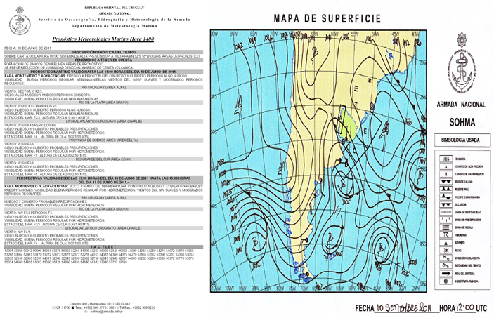 Meteo